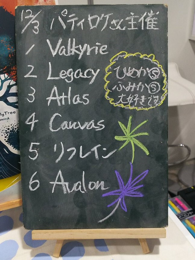 amiinAセトリボード(20171203(2))